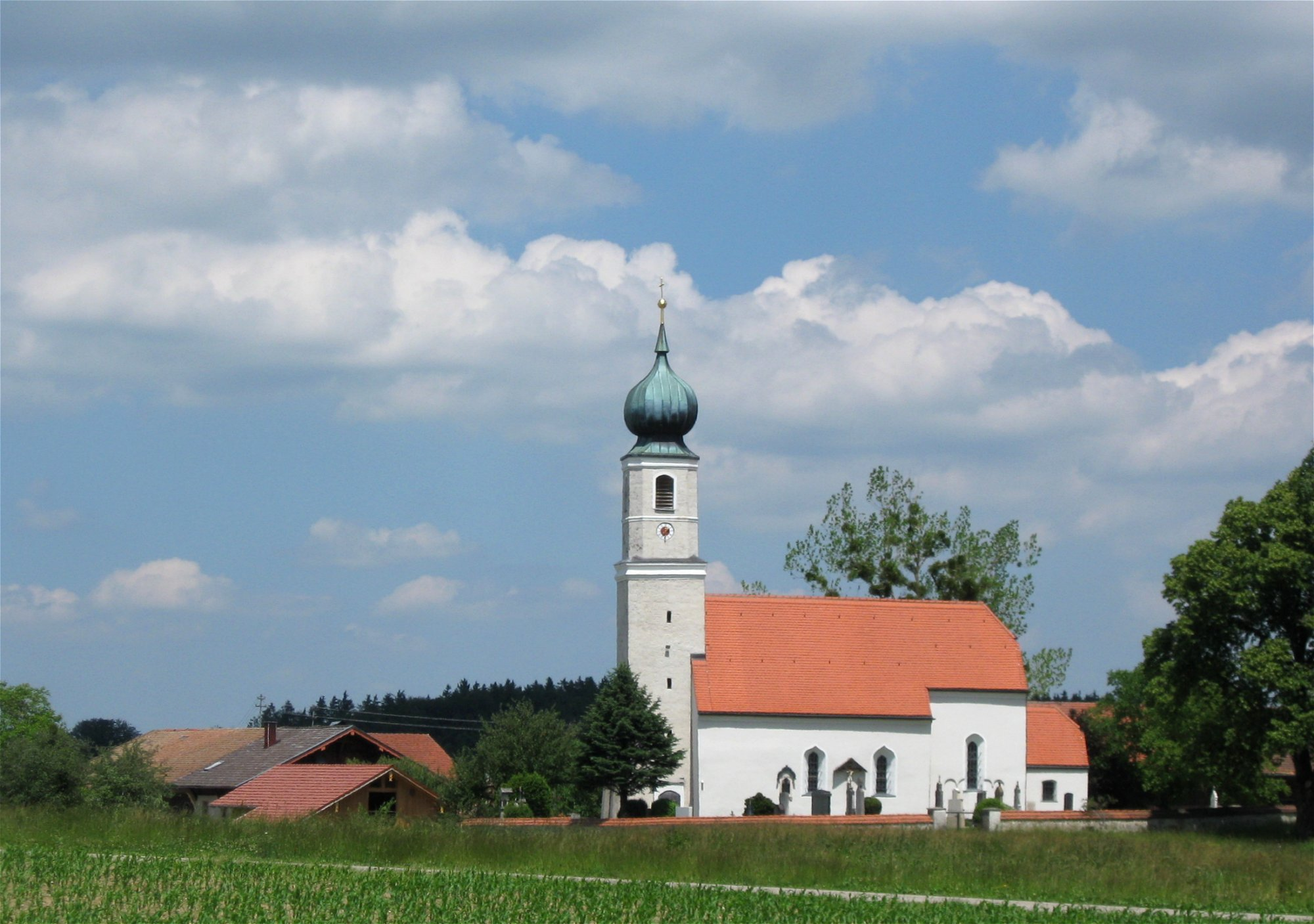 Kath. Filialkirche Mariä Geburt; ehem. Wallfahrtskirche, romanischer Tuffquaderbau um 1200, Ausbau um 1630 in nachgotischen Formen, Turm 18. Jh.; mit Ausstattung. Ortsteil Kreuz der Gemeinde Glonn, Landkreis Ebersberg